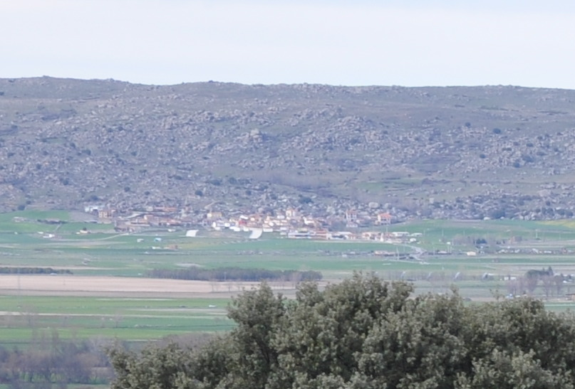 Panorámica de Salobral, Muñopepe y La Serrada en el valle de Amblés desde la sierra de Yemas, Provincia de Ávila, España.